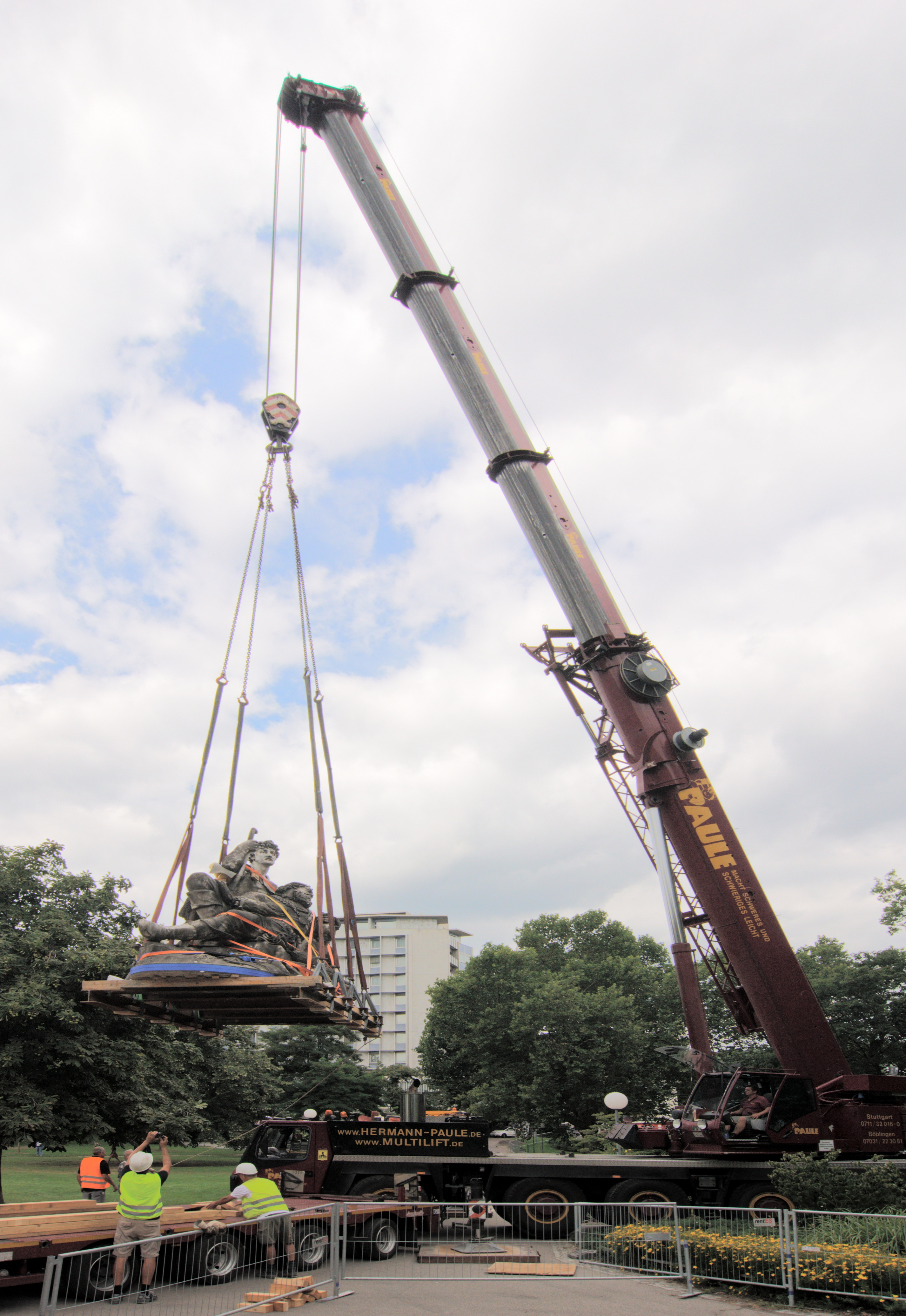 Umzug der Eberhardsgruppe aus dem mittleren in den oberen Schlossgarten im Zuge von Stuttgart 21. Heben vom Tieflader auf den neuen Standort.